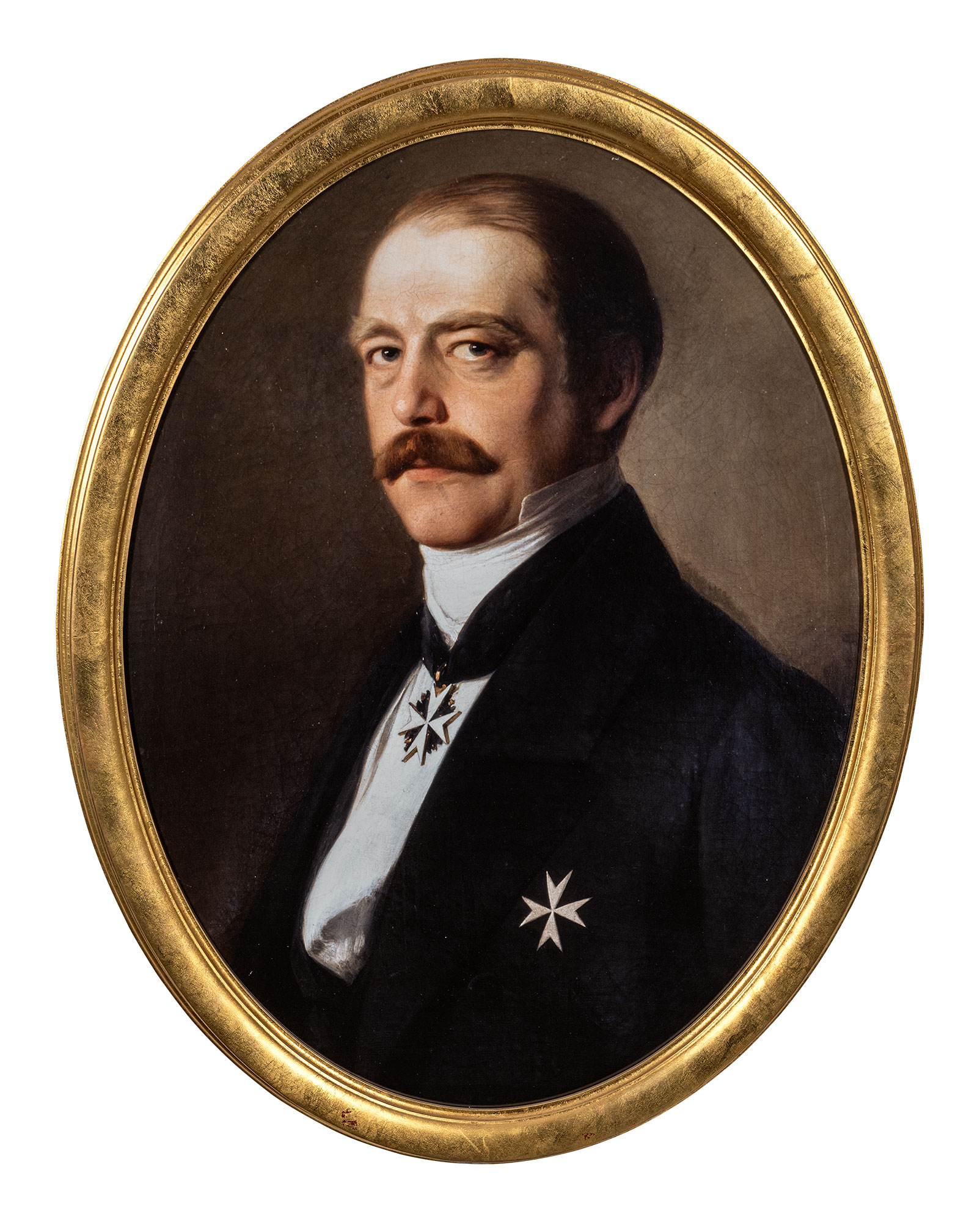 Bundestagsgesandter in Frankfurt 1858